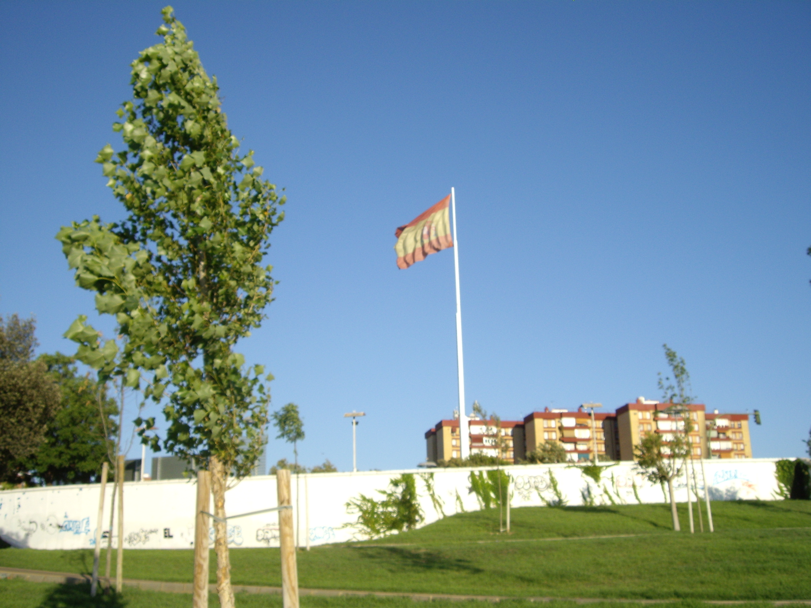 Parque de San Jerónimo de Sevilla en su parte más próxima a la Glorieta Olímpica.